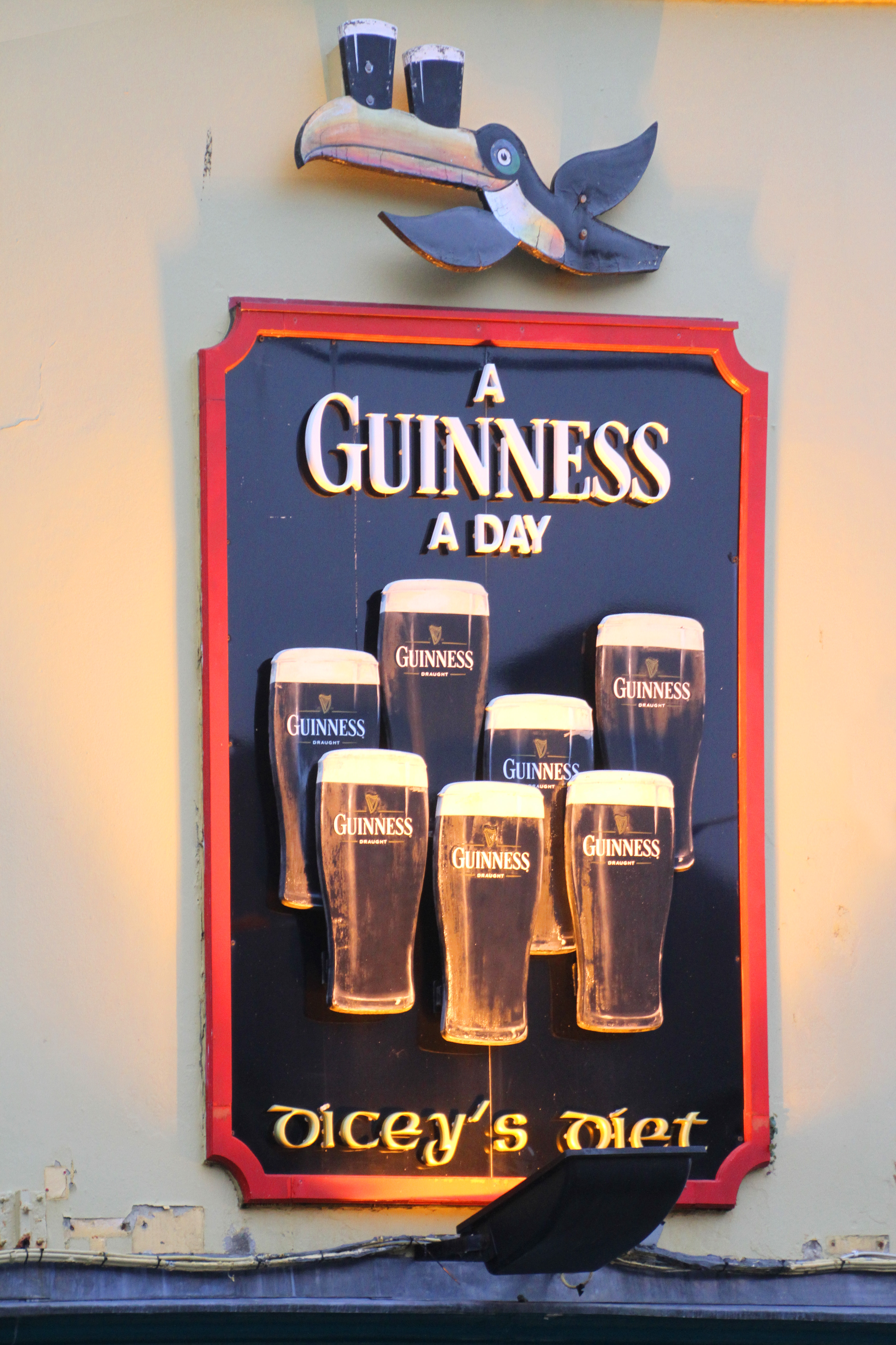 Ballyshannon